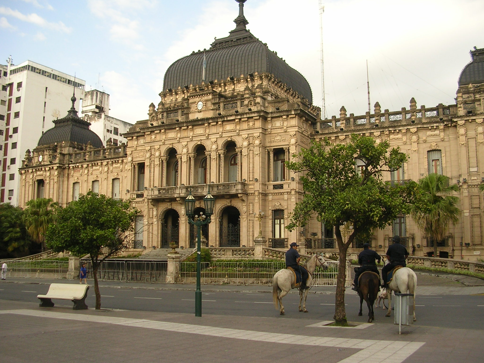 Casa de Gobierno de San Miguel de Tucumán (Argentina)